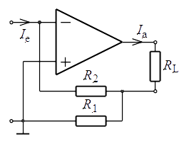 Strom-Strom-Umformer oder Stromverstärker mittels Operationsverstärker